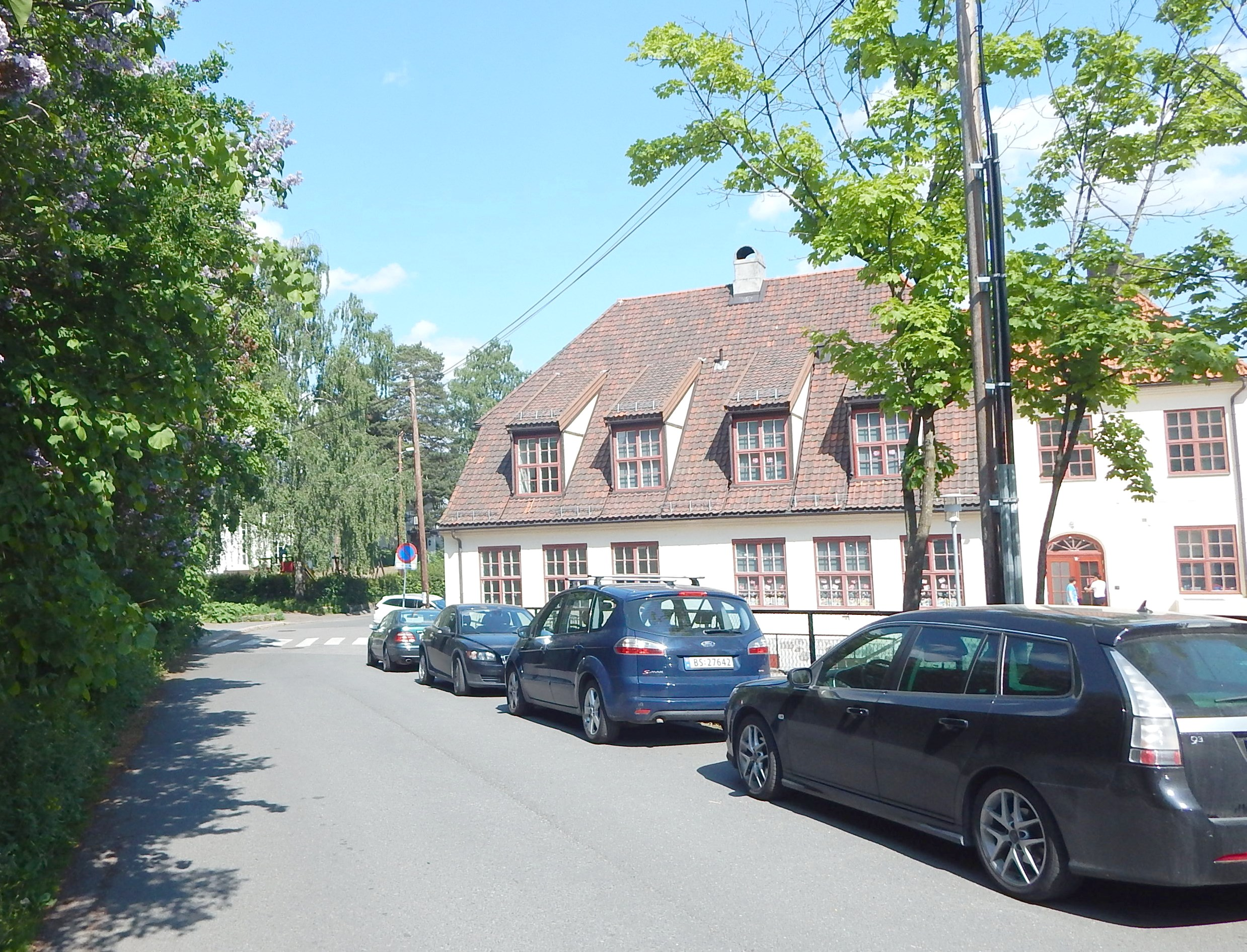 Blokkaveien ved Bestum skole